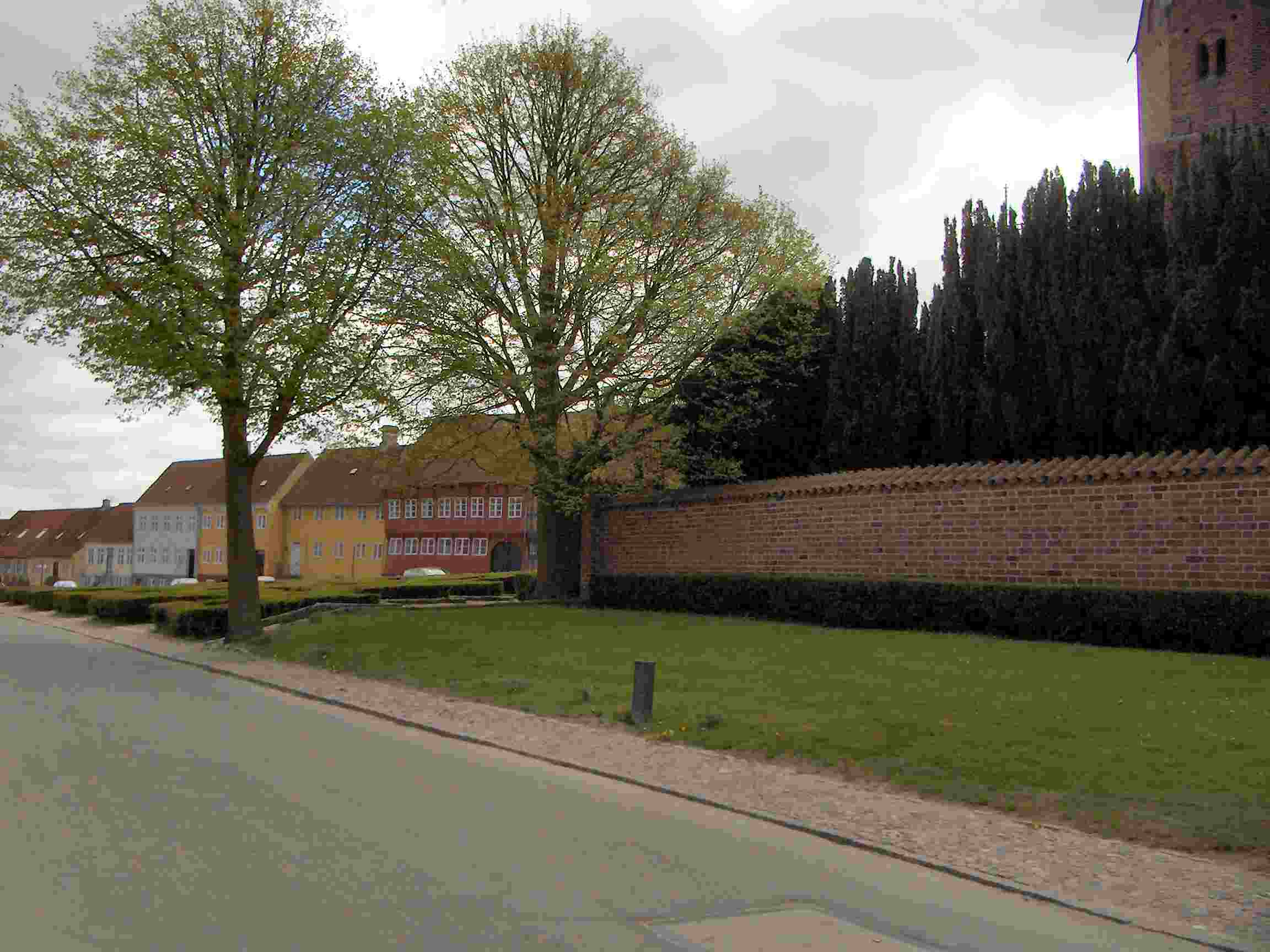 Del af Adelgade i Højbyen i Kalundborg, optaget af mig selv